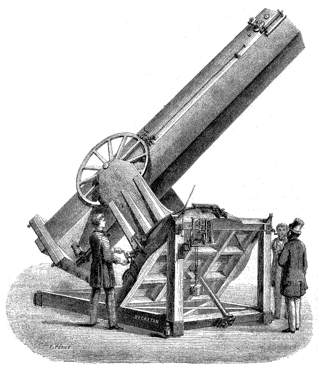 Le grand télescope Foucault, de l'Observatoire de Marseille pour La Nature, revue des sciences, n° 24, page 371.